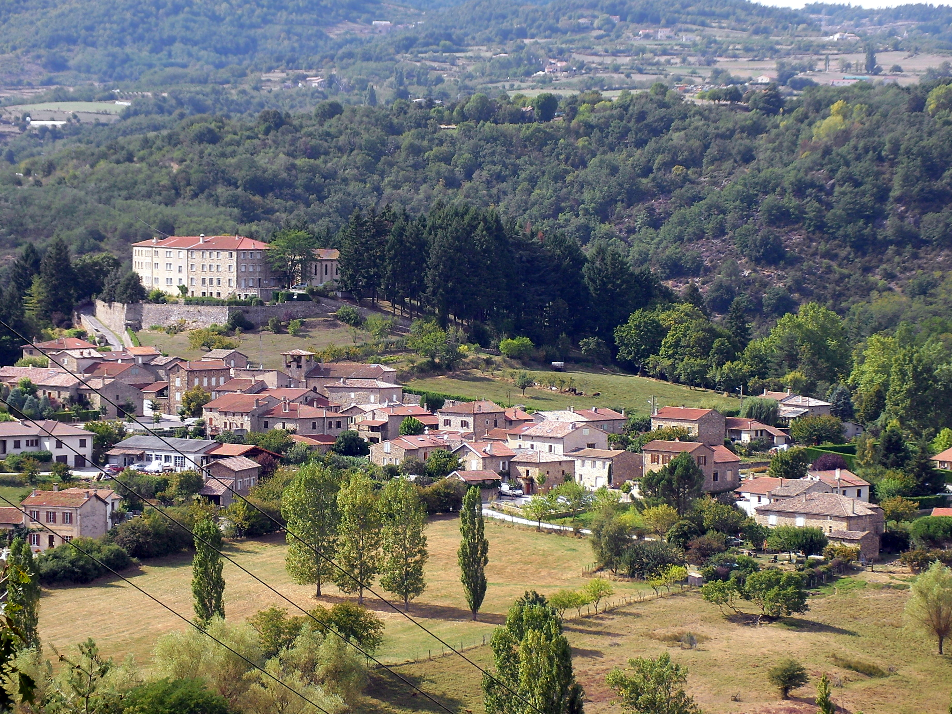 vue du village de Boucieu-le-Roi